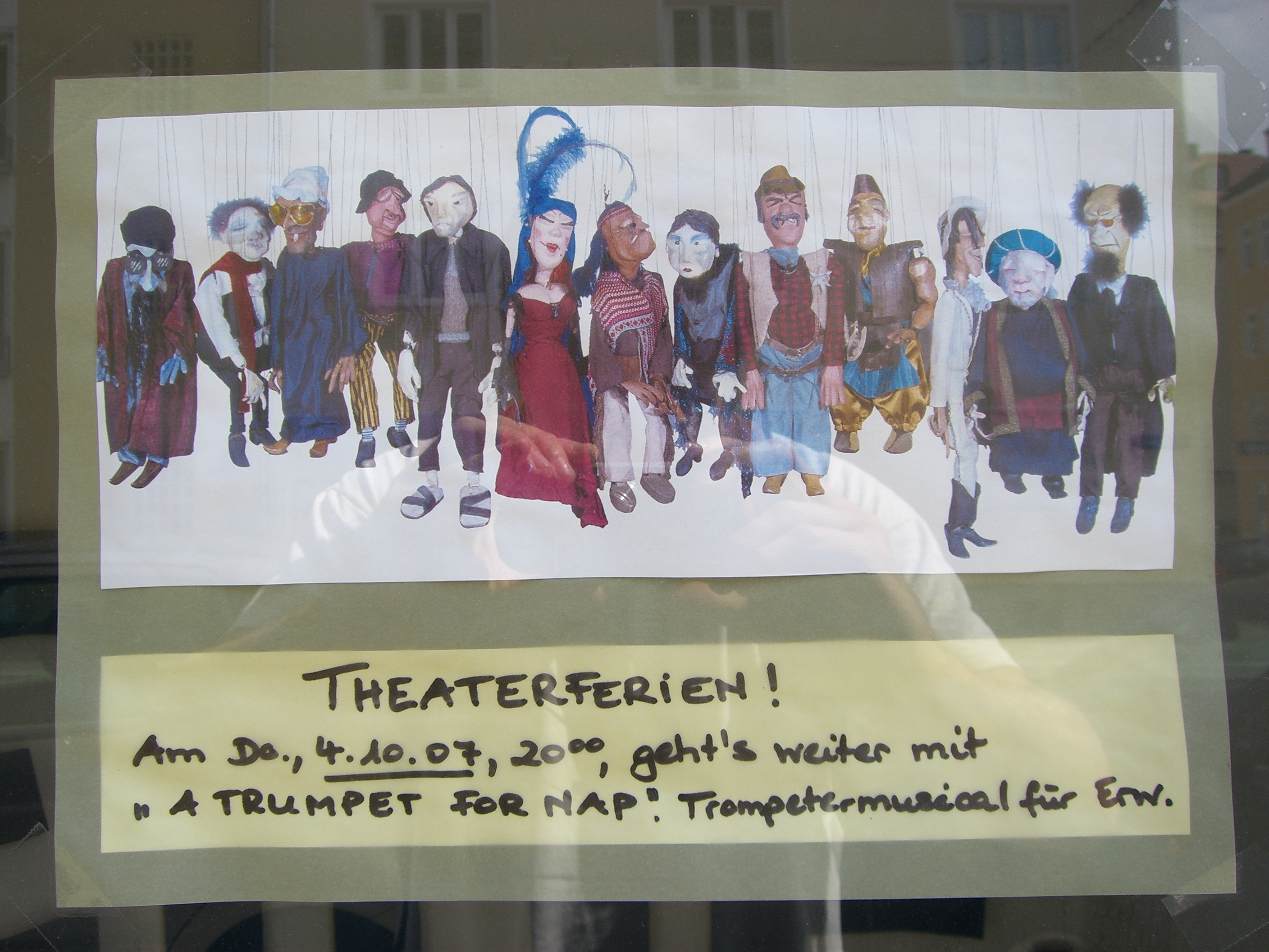 München - Marionettentheater 'Kleines Spiel' (Ferienschild).jpg